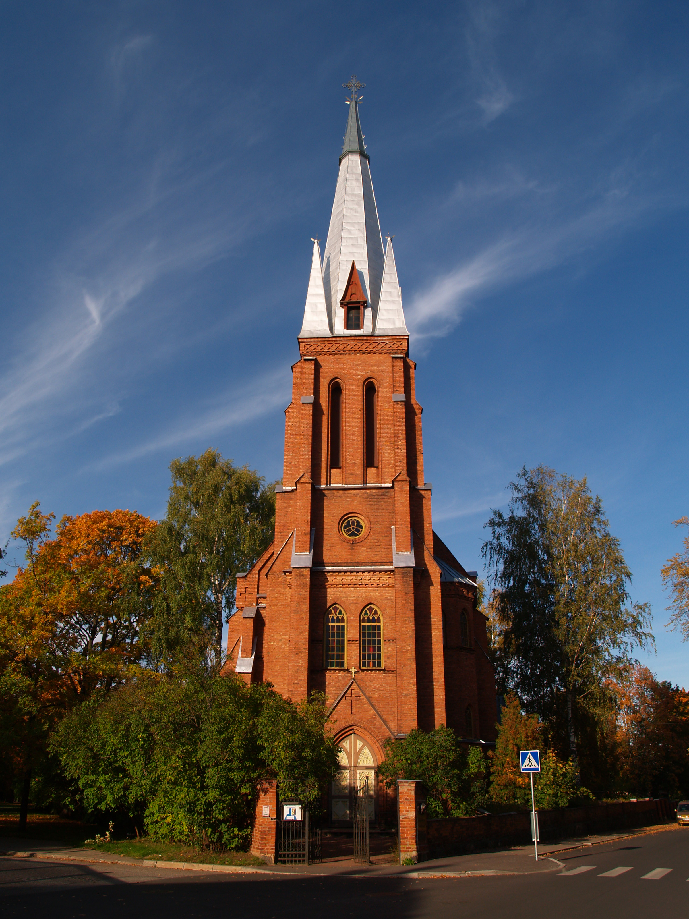 Tartu Katoliku kirik